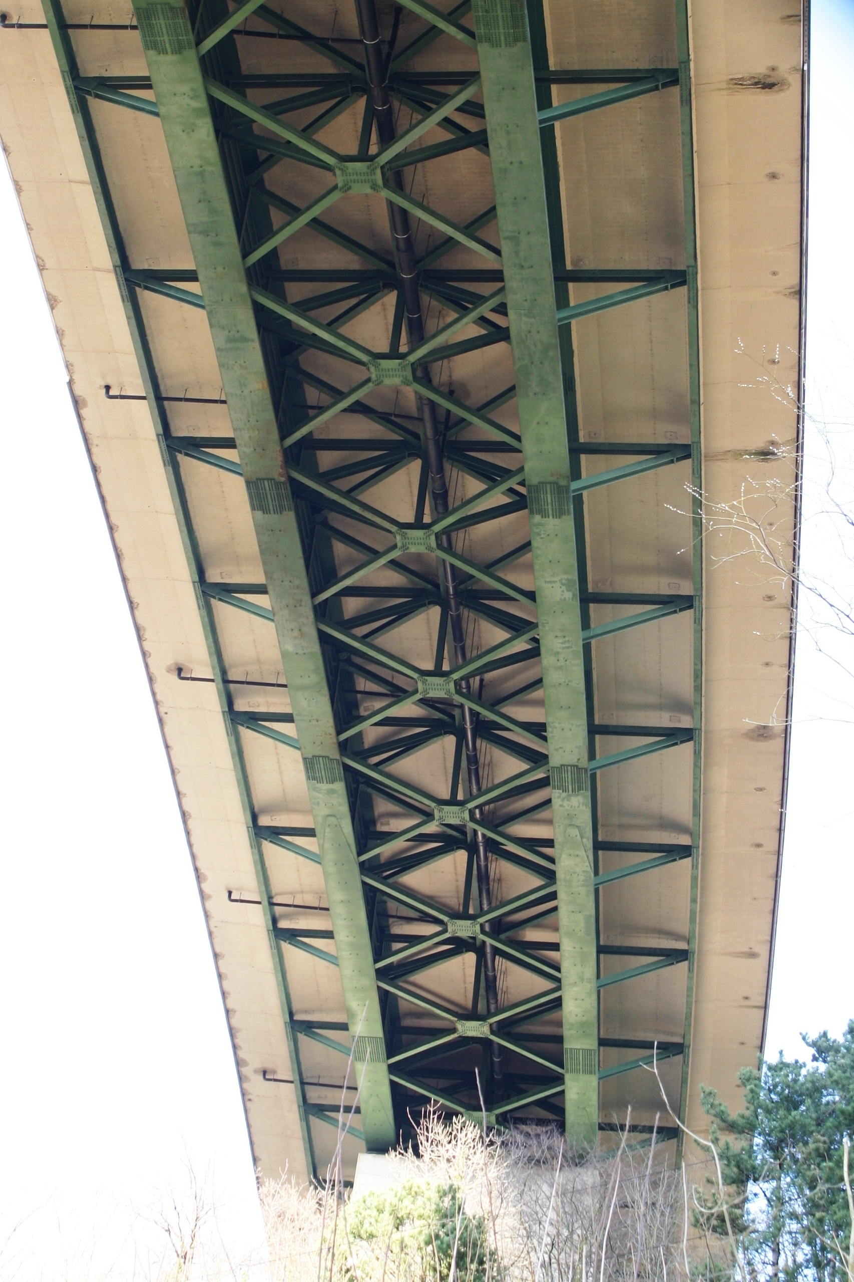 Vue op den Tablier vum Viaduc vu Remouchamps.